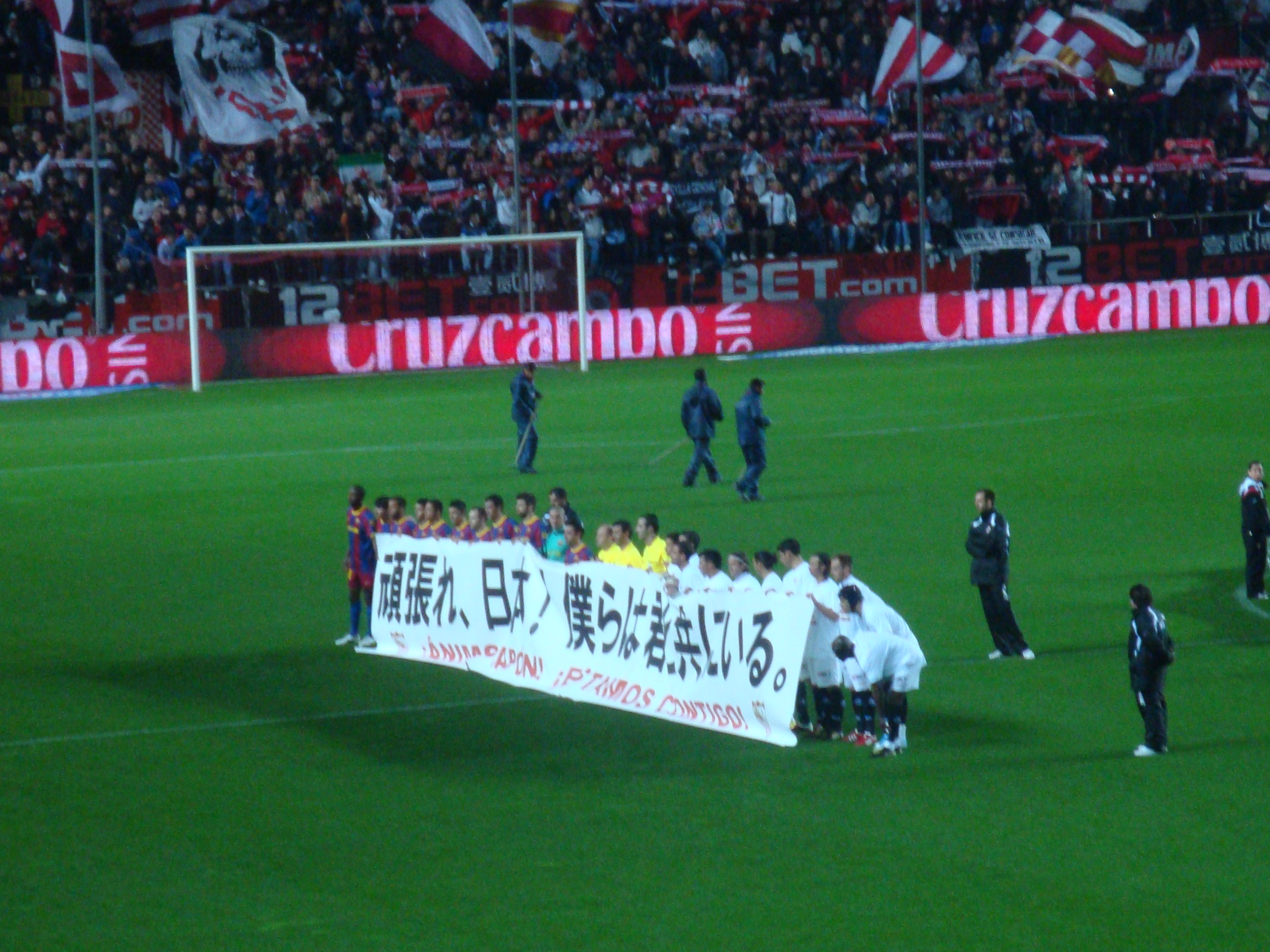 Homenaje a las víctimas del terremoto de Japón en partido Sevilla-FC Barcelona en el estadio Sánchez Pizjuan en 2011